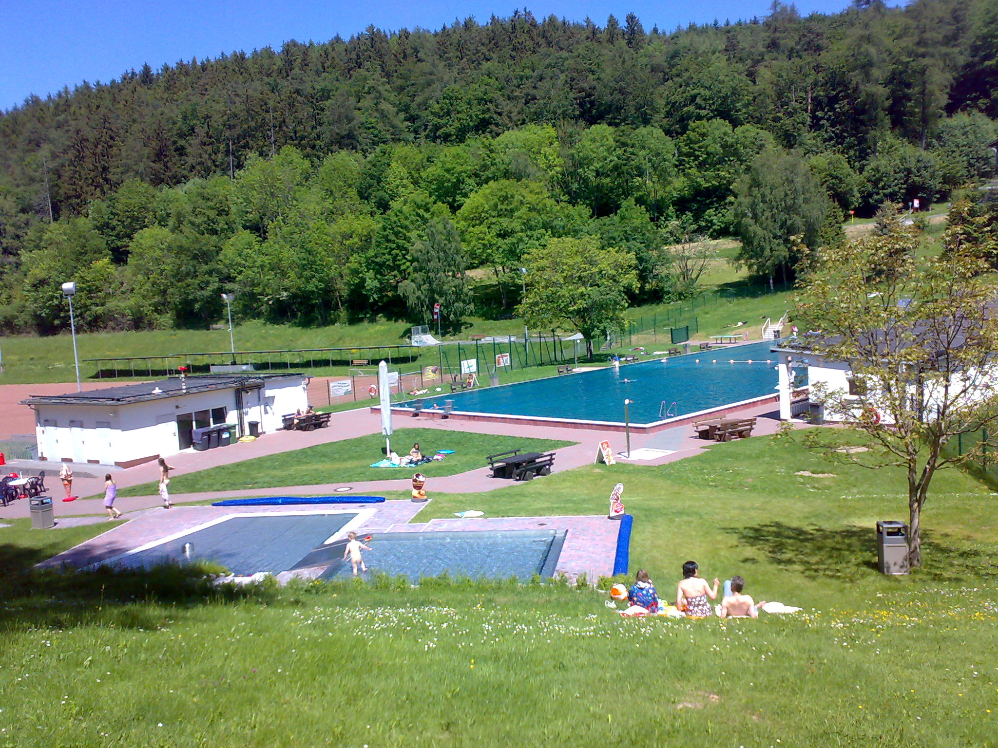 Freibad Schmitten, Deutschland: Vordergrund: Kinderbecken, Hintergrund: Hauptbecken